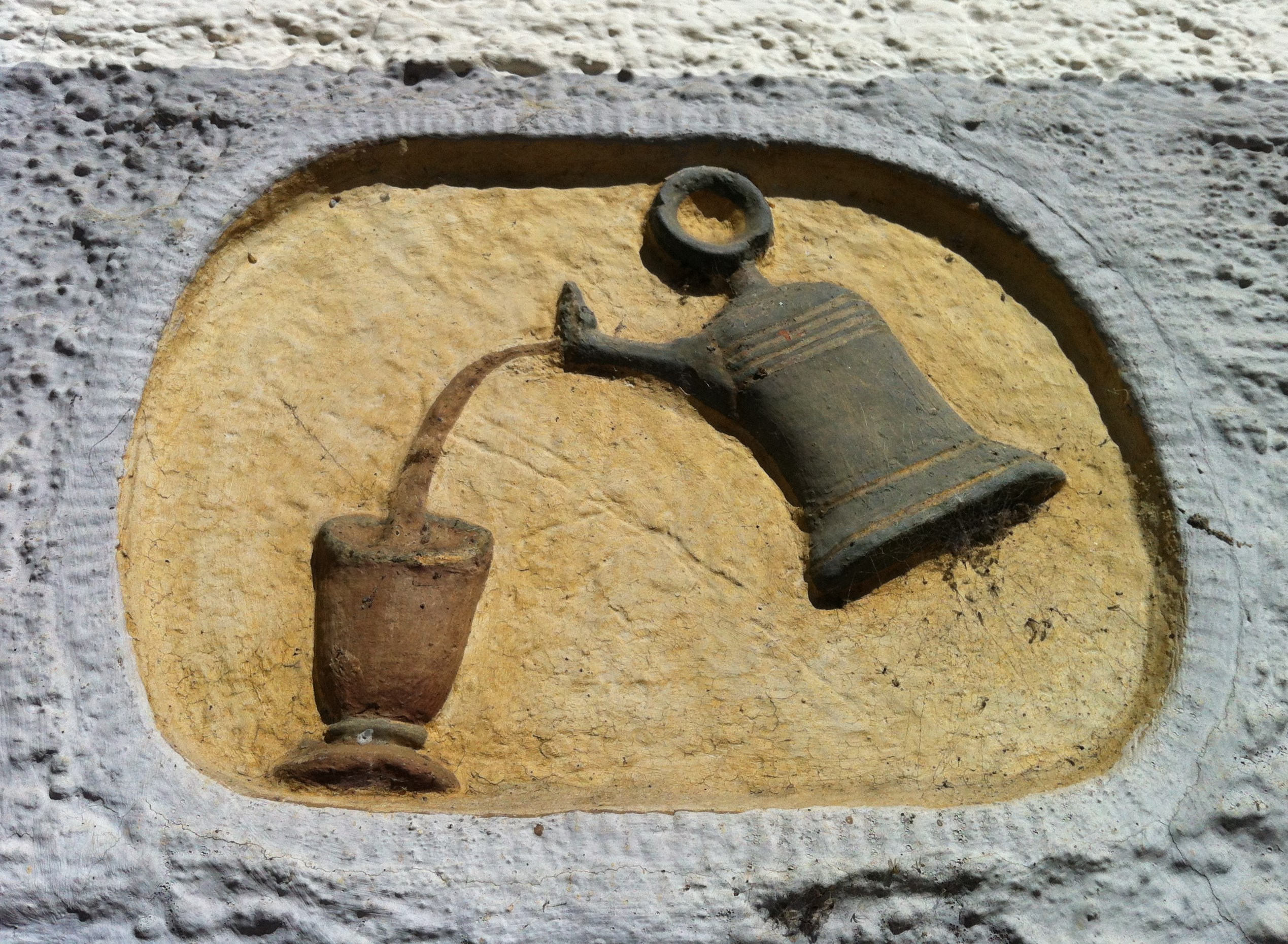 Gasthaus Der Engel in Rheinheim, Ortsteil der Gemeinde Küssaberg im Landkreis Waldshut in Baden-Württemberg. Figur am linken Eingangstor an der Straßenseite, vermutlich Zeichen der Kellerschänke.